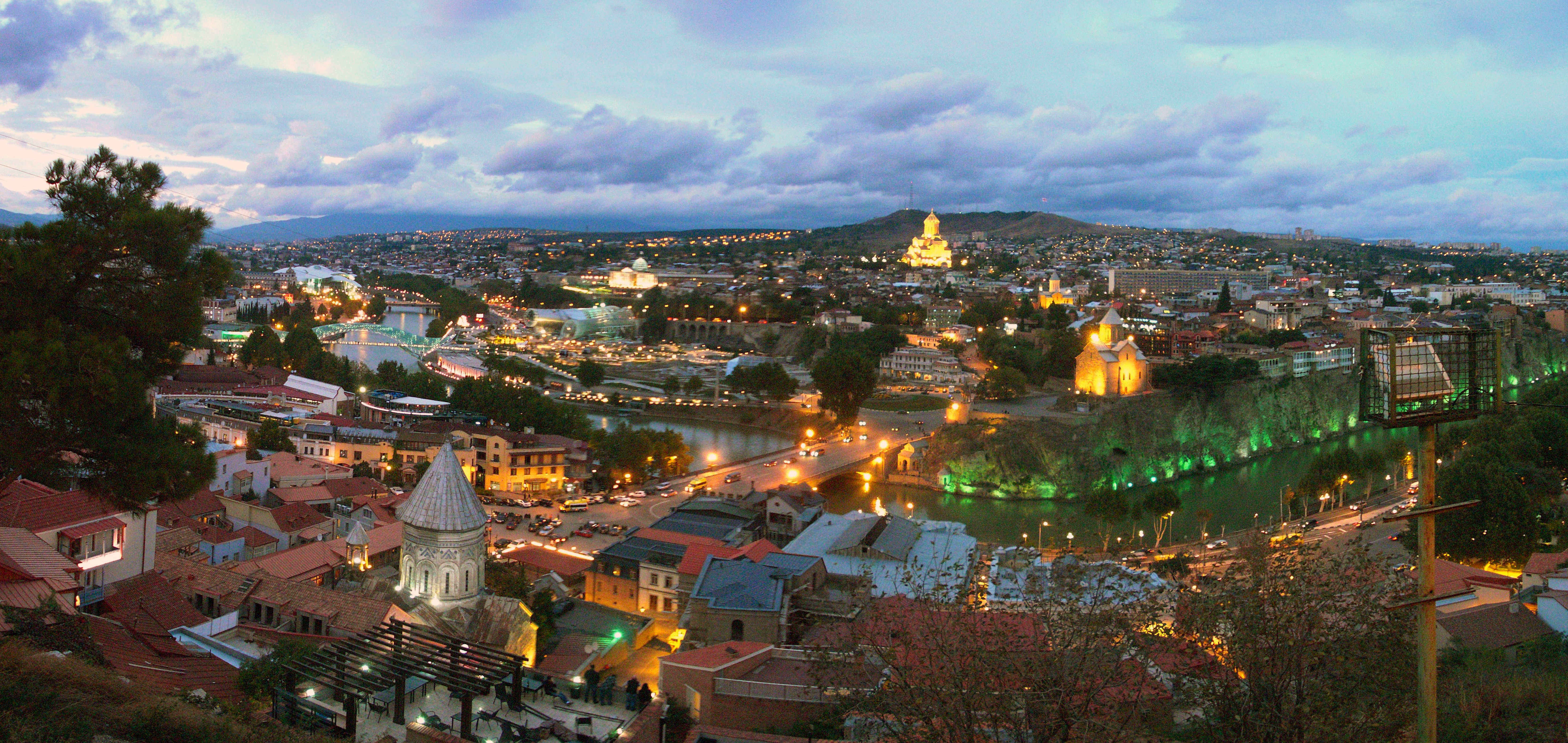 Tbilisi sunset